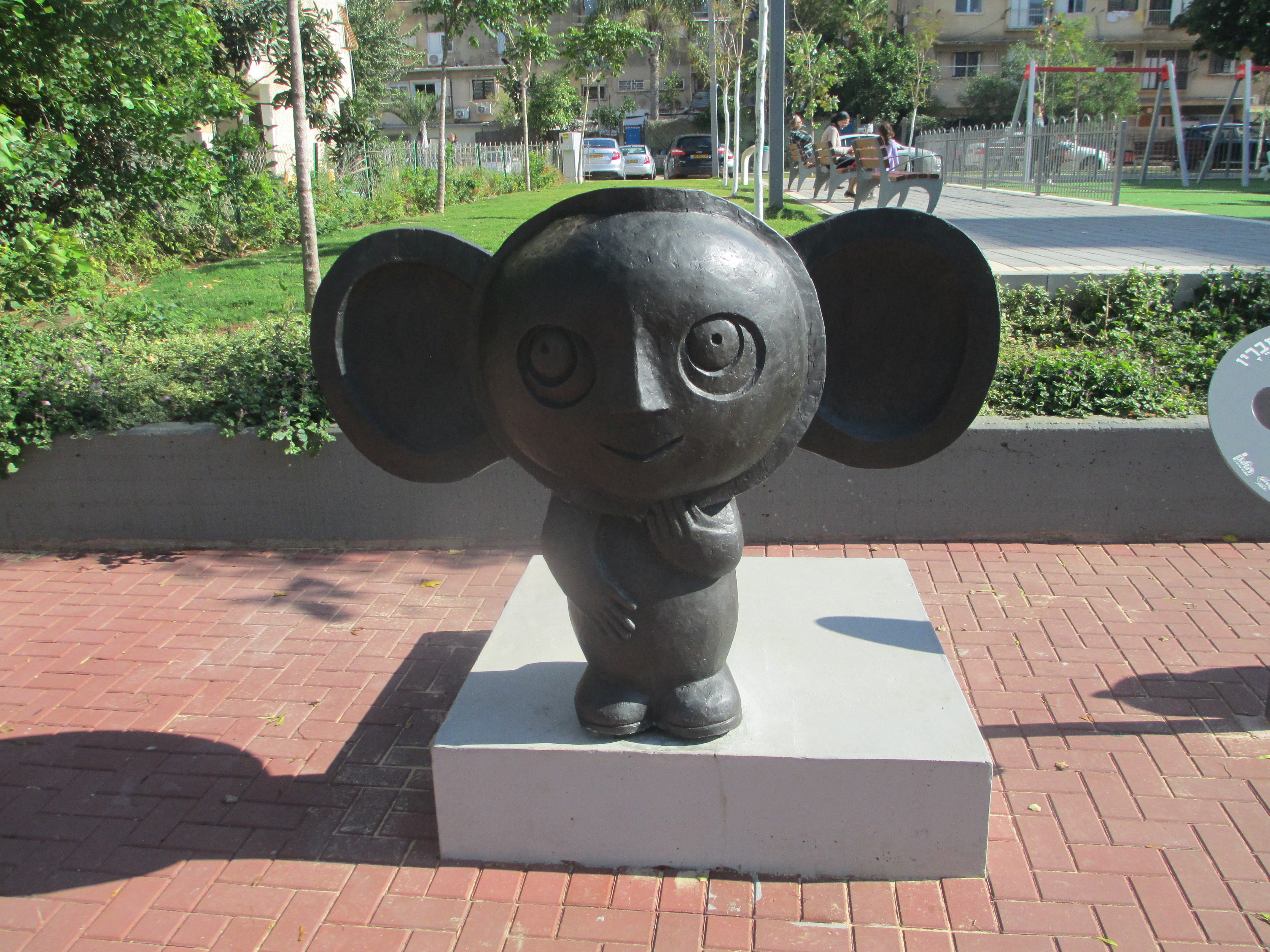 גן סיפור צ'בורשקה וחבריו ברחוב משה שרת 27 בחולון